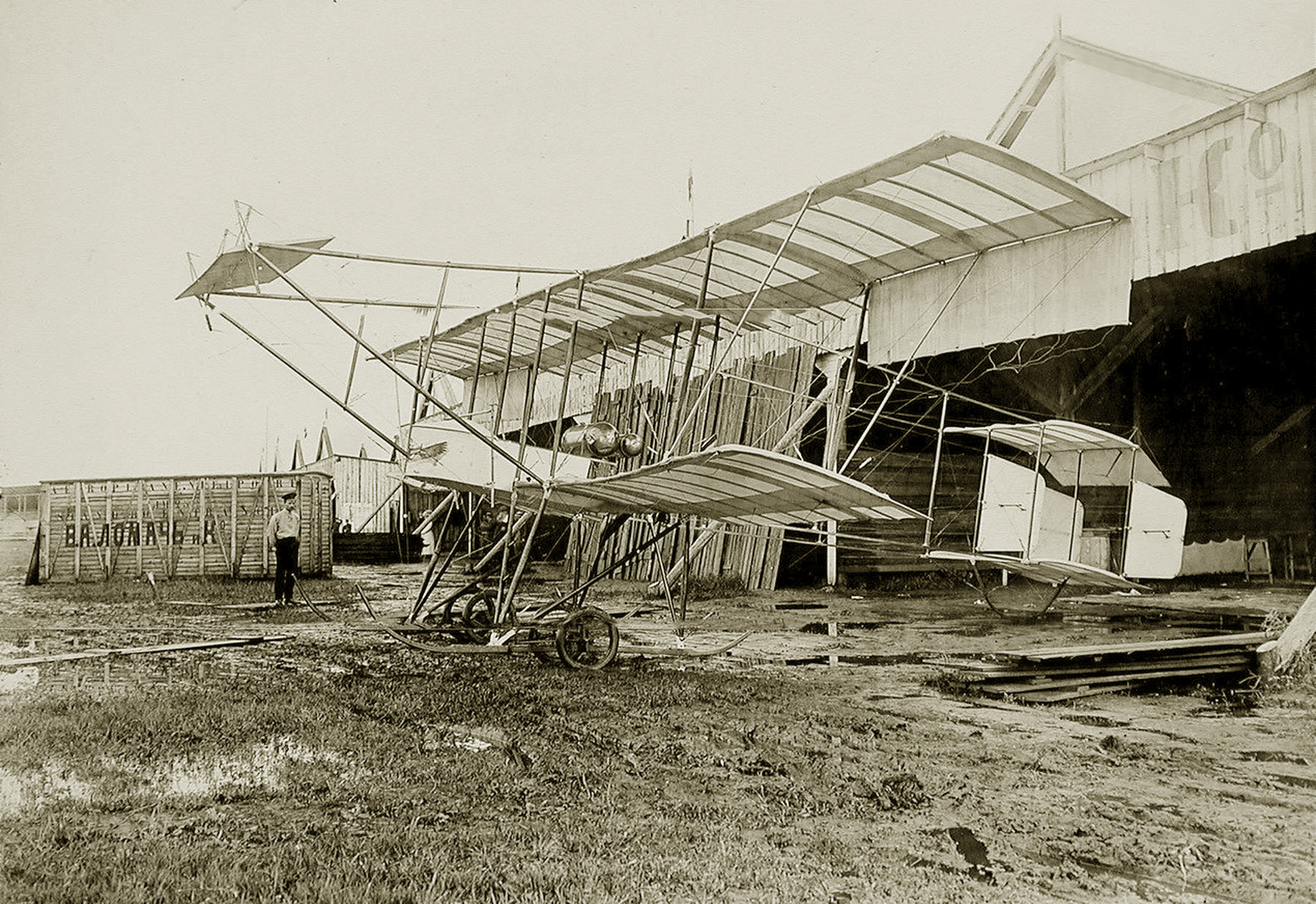 Самолёт ПТА типа «Фарман-4» В. А. Лебедева и С. А. Ульянина построенный в ангаре Петербургского товарищества авиации «Ломач и К°» (с 1914 г. - АО воздухоплавания «В. А. Лебедев»)